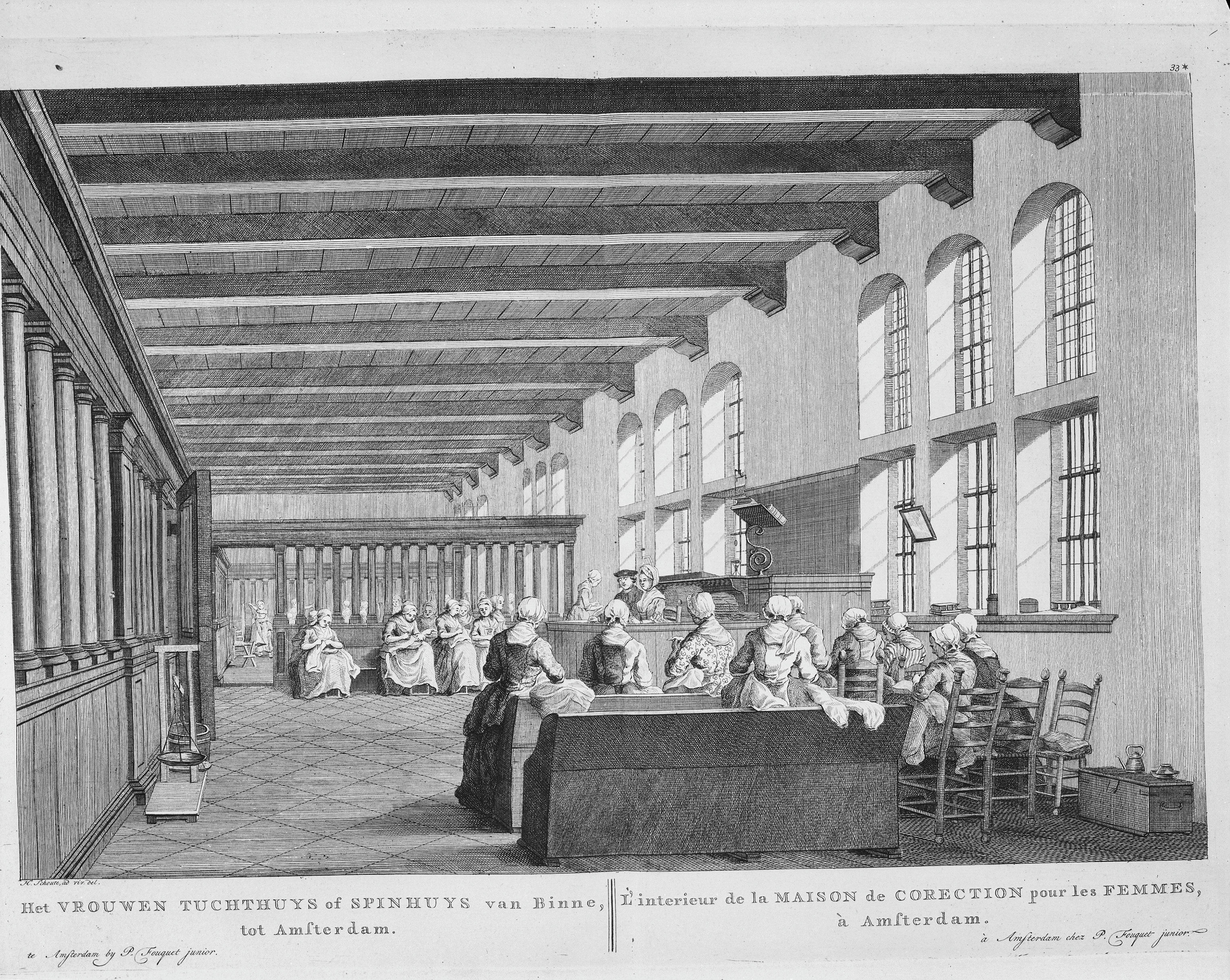 Spinhuis thans Politiebureau: aanzicht